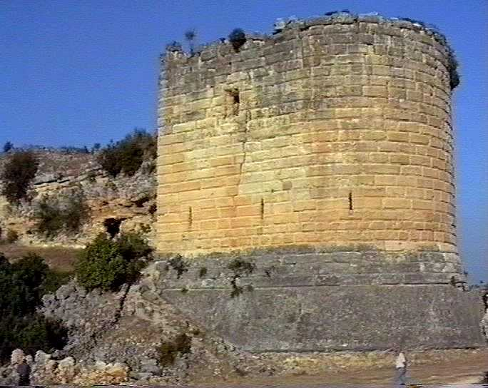 Kreuzritterburg bei Kozkalesi nahe Antakya, Südtürkei